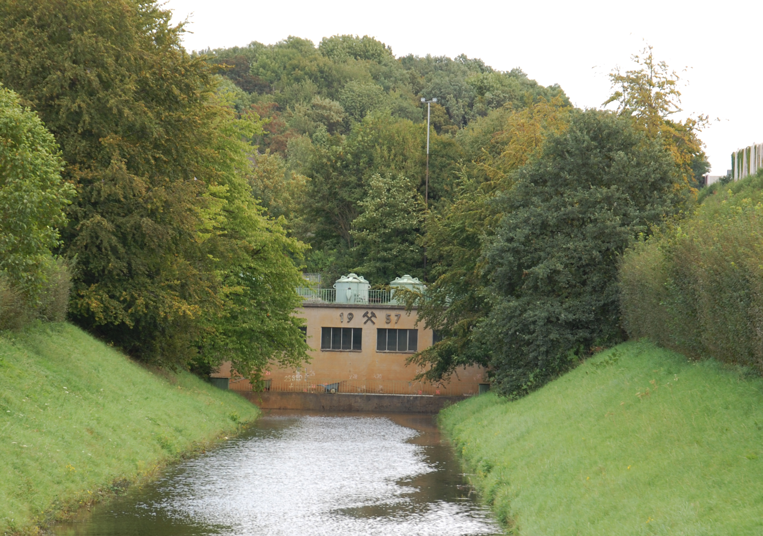 Pumpwerk zum Ville-Stollen am Kanal in Horrem/Götzenkirchen nahe der Autobahn A 4, Kerpen